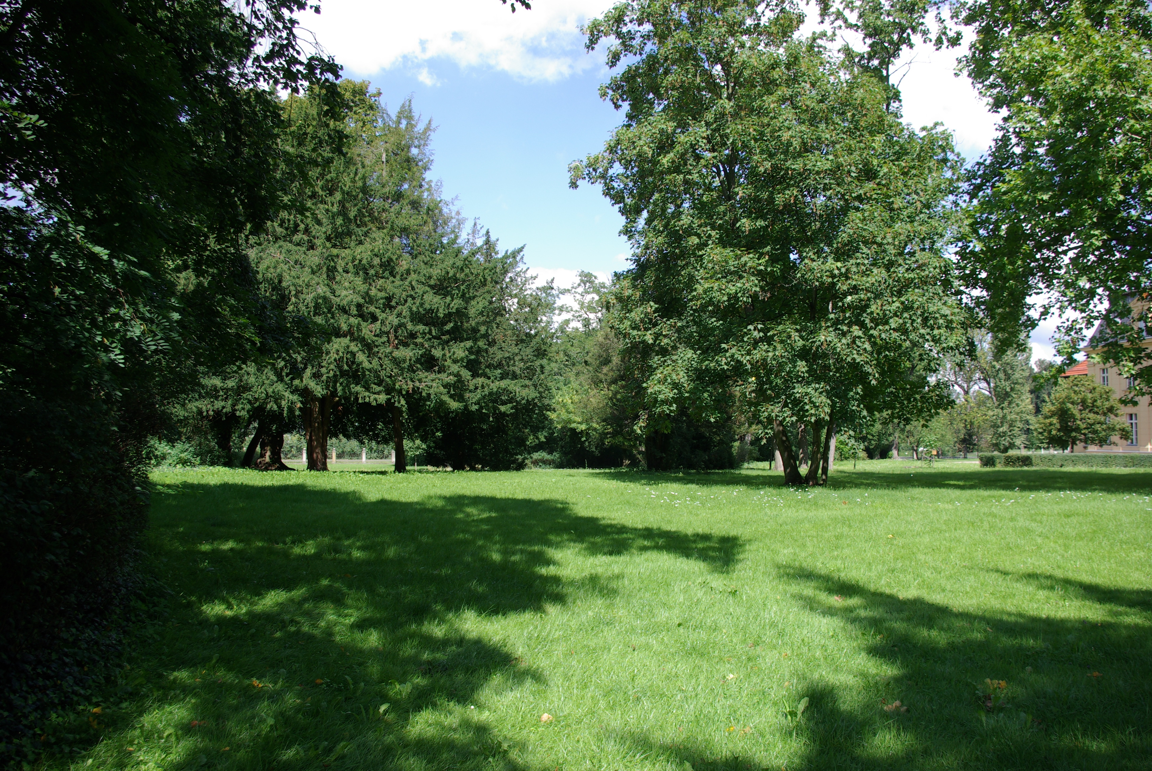 Bad Freienwalde (Oder) Ortsteil Altranft. Das Schlosspark (Herrenhaus) ist Teil des Freilichtmuseums und steht unter Denkmalschutz.